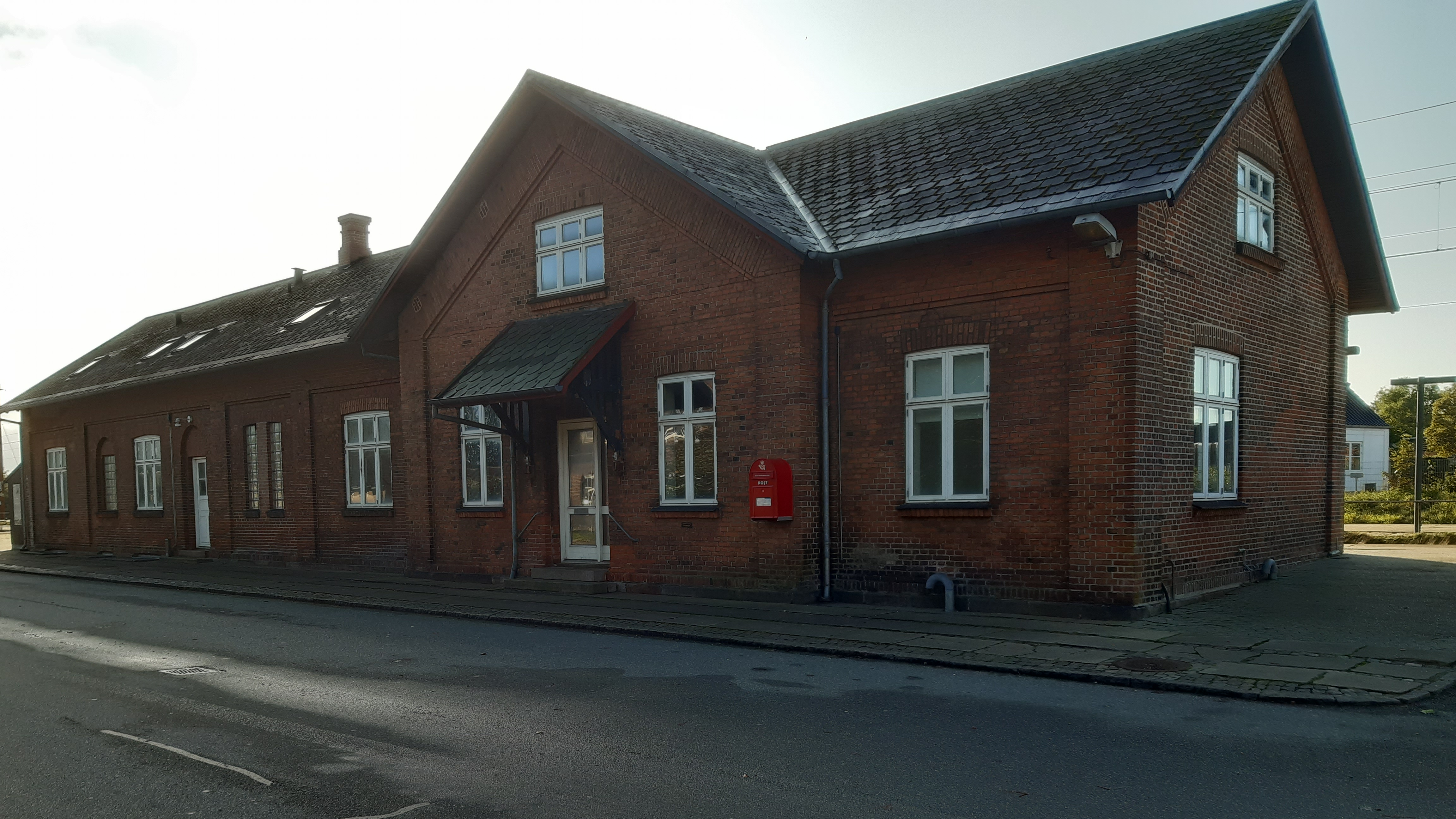 Stationsbygningen set fra vejsiden